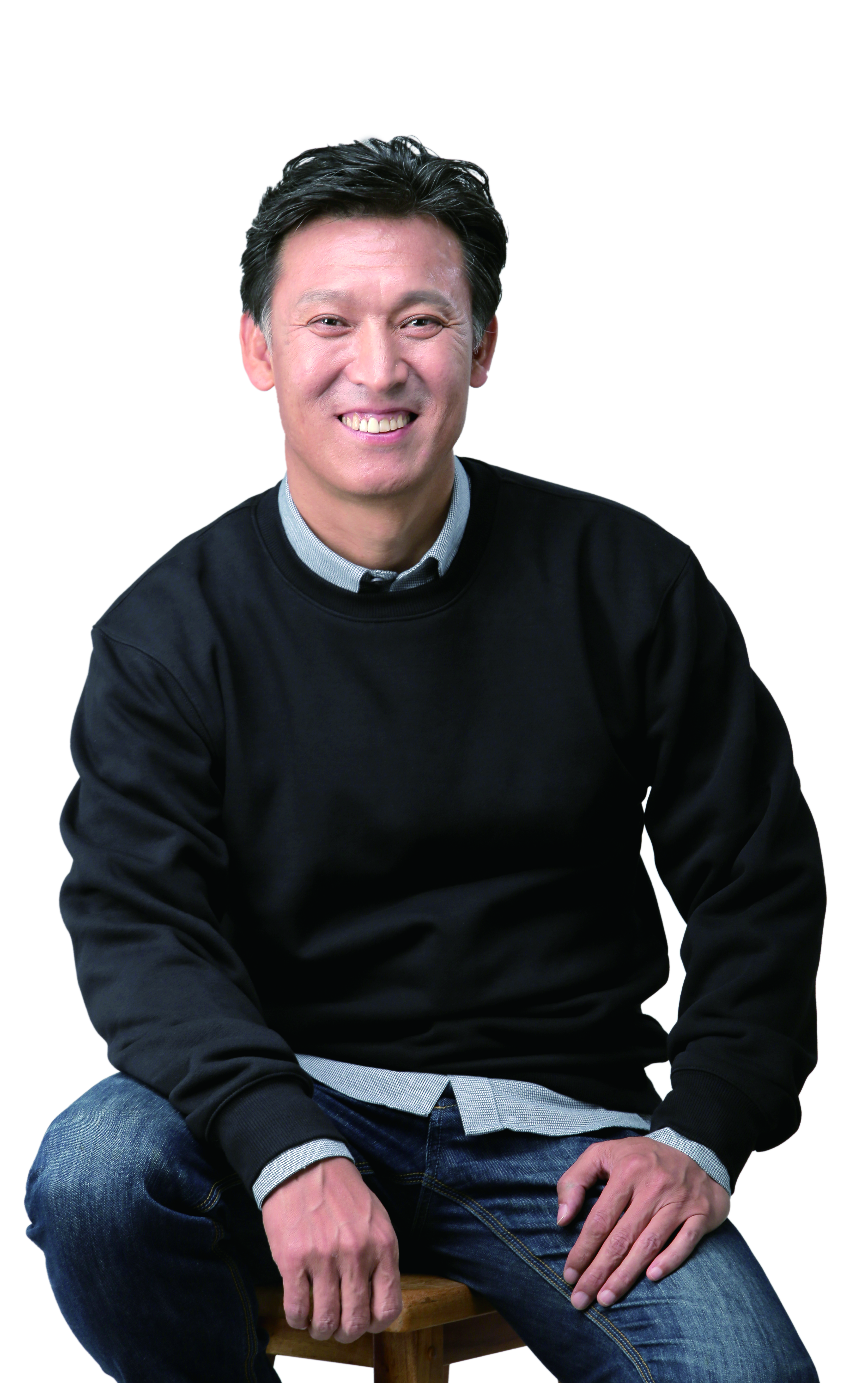 김영문